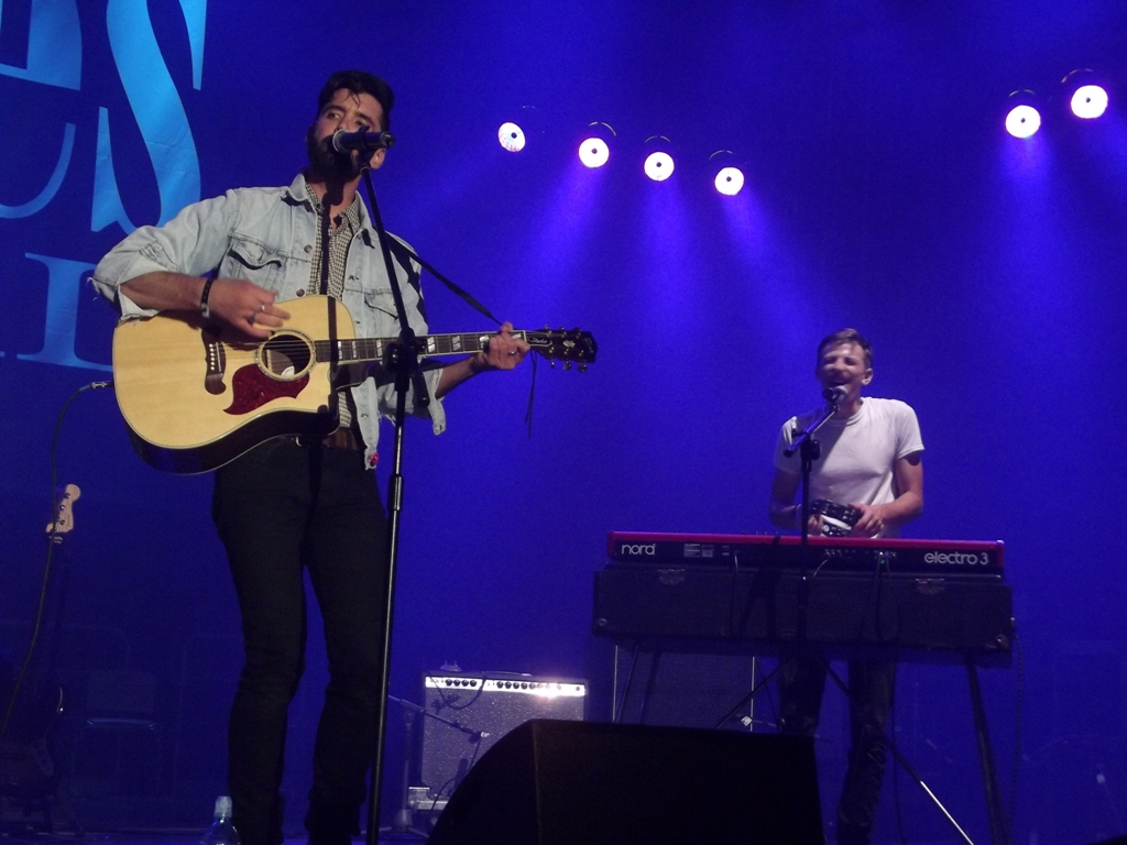 Zdjęcie zrobione podczas 33. Rawa Blues Festival, w katowickim Spodku.